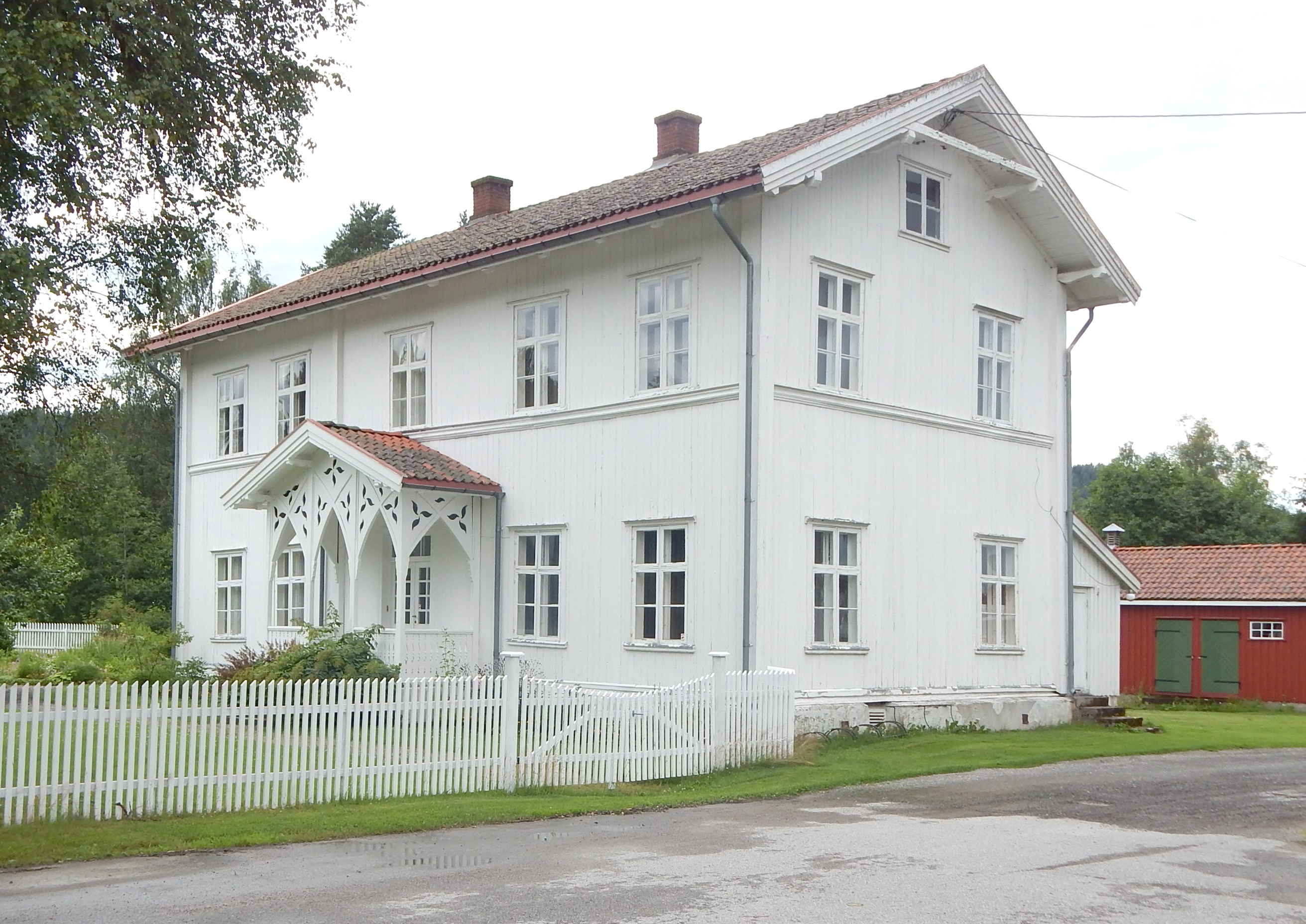 Allmuestua ved Eidskog kirke stod tidligere ved prestegården. Huser i dag Eidskog skolemuseum.